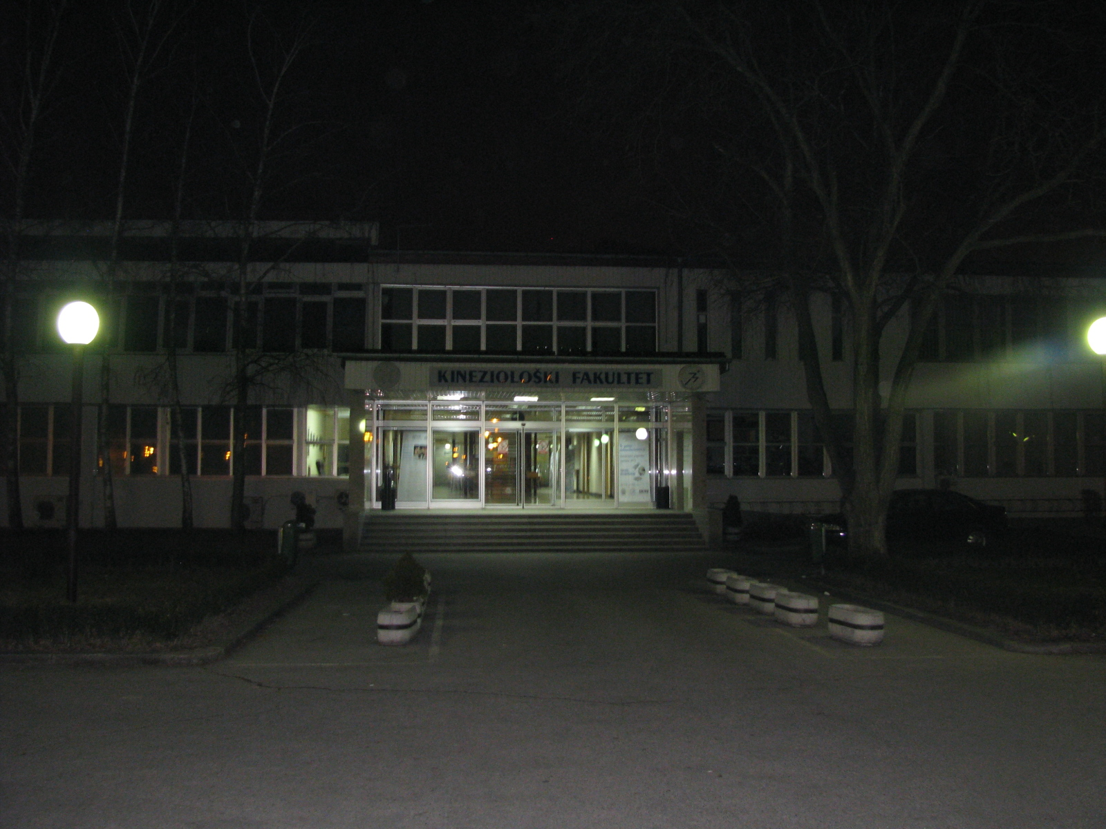 Kineziološki fakultet u Zagrebu